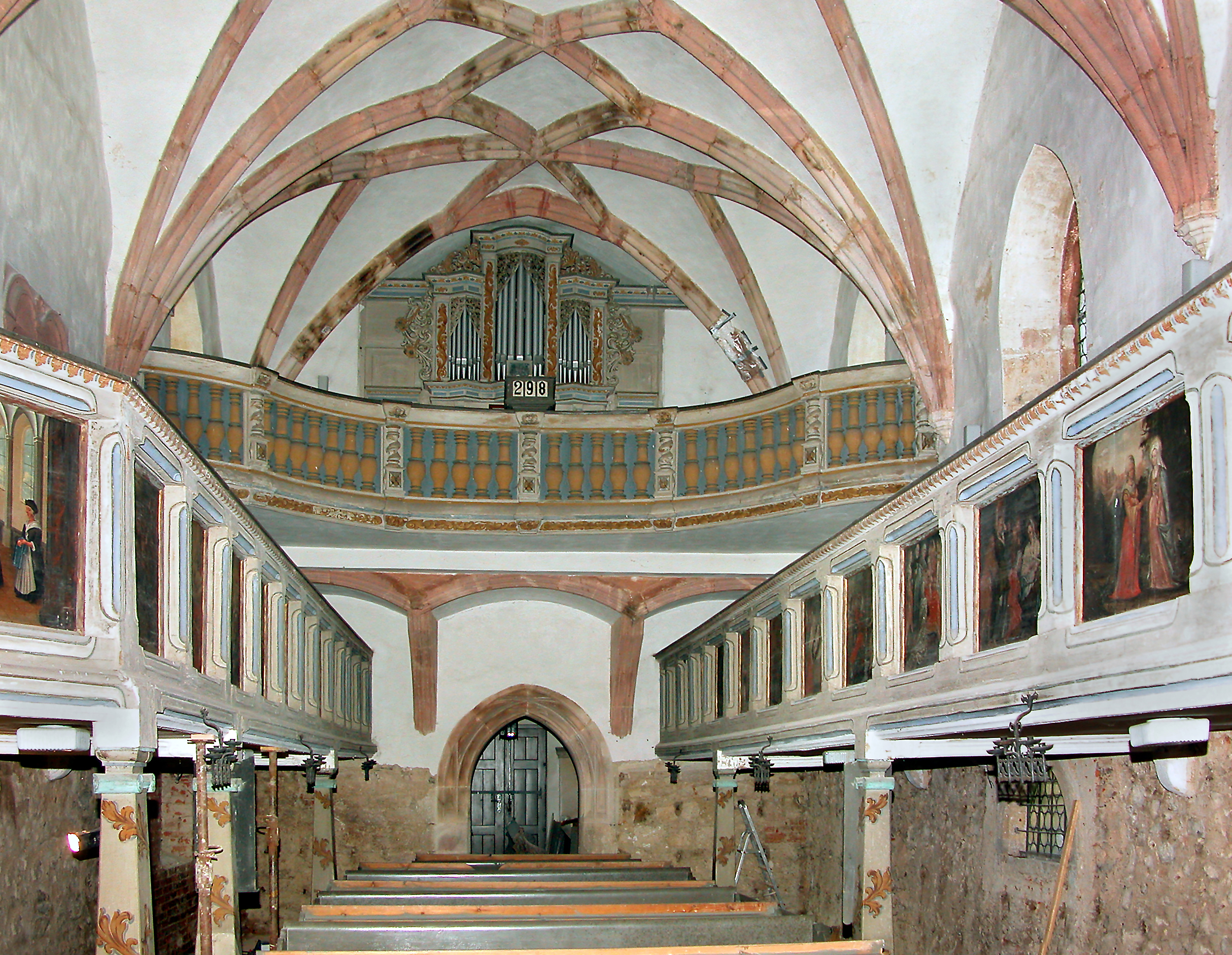 01.09.2009 04654 Gnandstein (Kohren-Sahlis Stadt Frohburg): Dorfkirche (GMP: 51.016505,12.57242) während der Sanierung. Blick zur Orgel. Erbaut wurde die Kirche ab 1508 im spätgotischen Stil, nachdem die alte Dorfkirche abgerissen worden war. 1577 wurde ein Turm angebaut. In der Kirche befindet sich die Ahnengalerie der Gnandsteiner Burgherren, die seit dem Mittelalter eng mit der Herrschaft über Kohren und Wolftitz verbunden waren. Die gotische Kirche diente über 300 Jahre dem Geschlecht derer von Einsiedel als Begräbnisstätte. [DSCN38668.TIF]20090901015DR.JPG(c)Blobelt